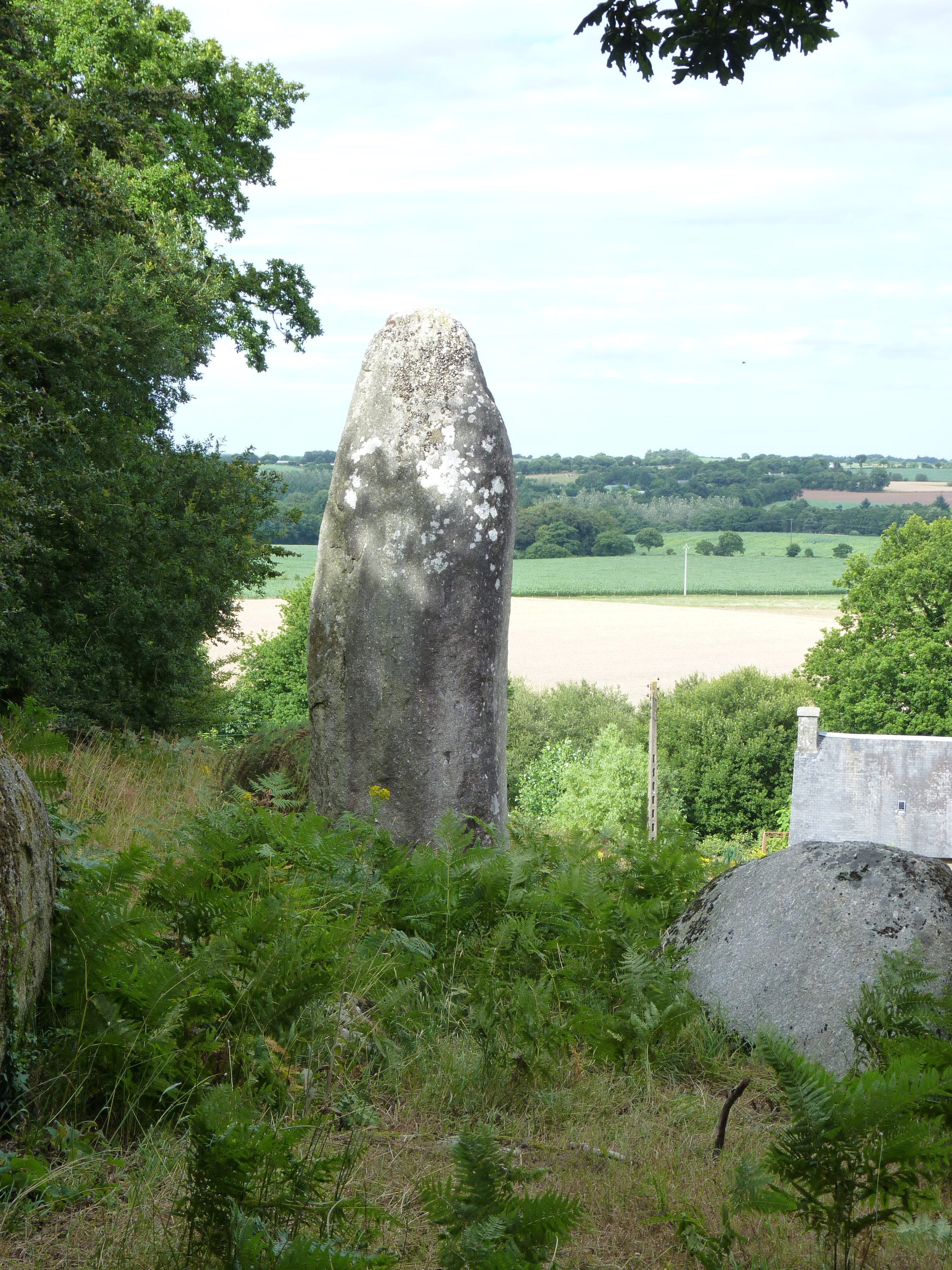 Le menhir domine le hameau